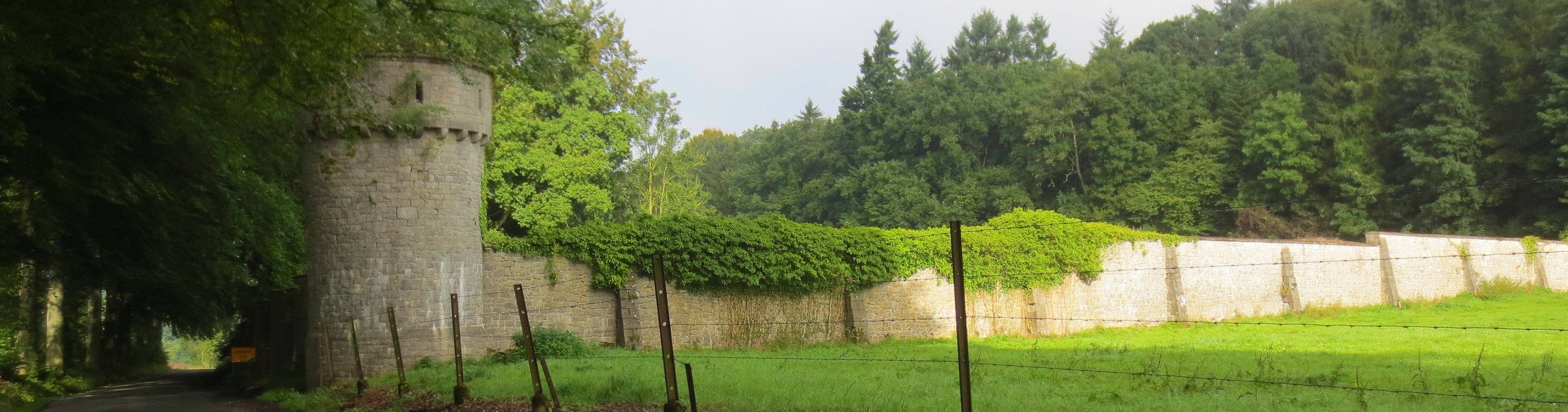 Vue d'une portion du mur d'enceinte de l'abbaye de Maredret (coté est)